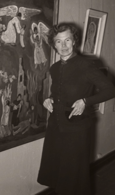 textilkonstnär